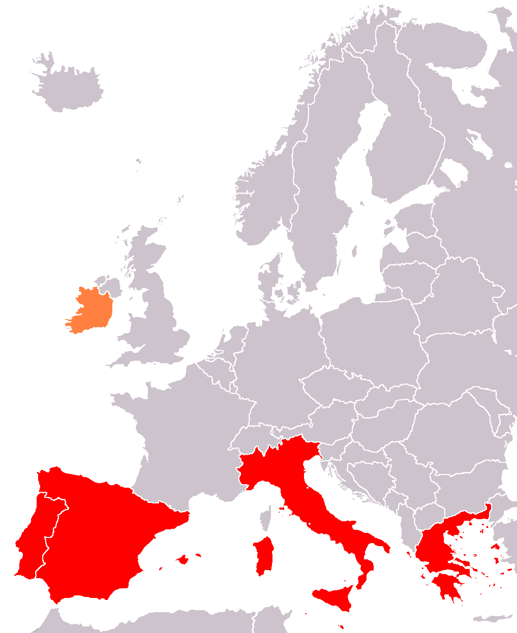 Mapa de los llamados PIGS : España, Portugal, Grecia, Italia (más Irlanda para los PIIGS)